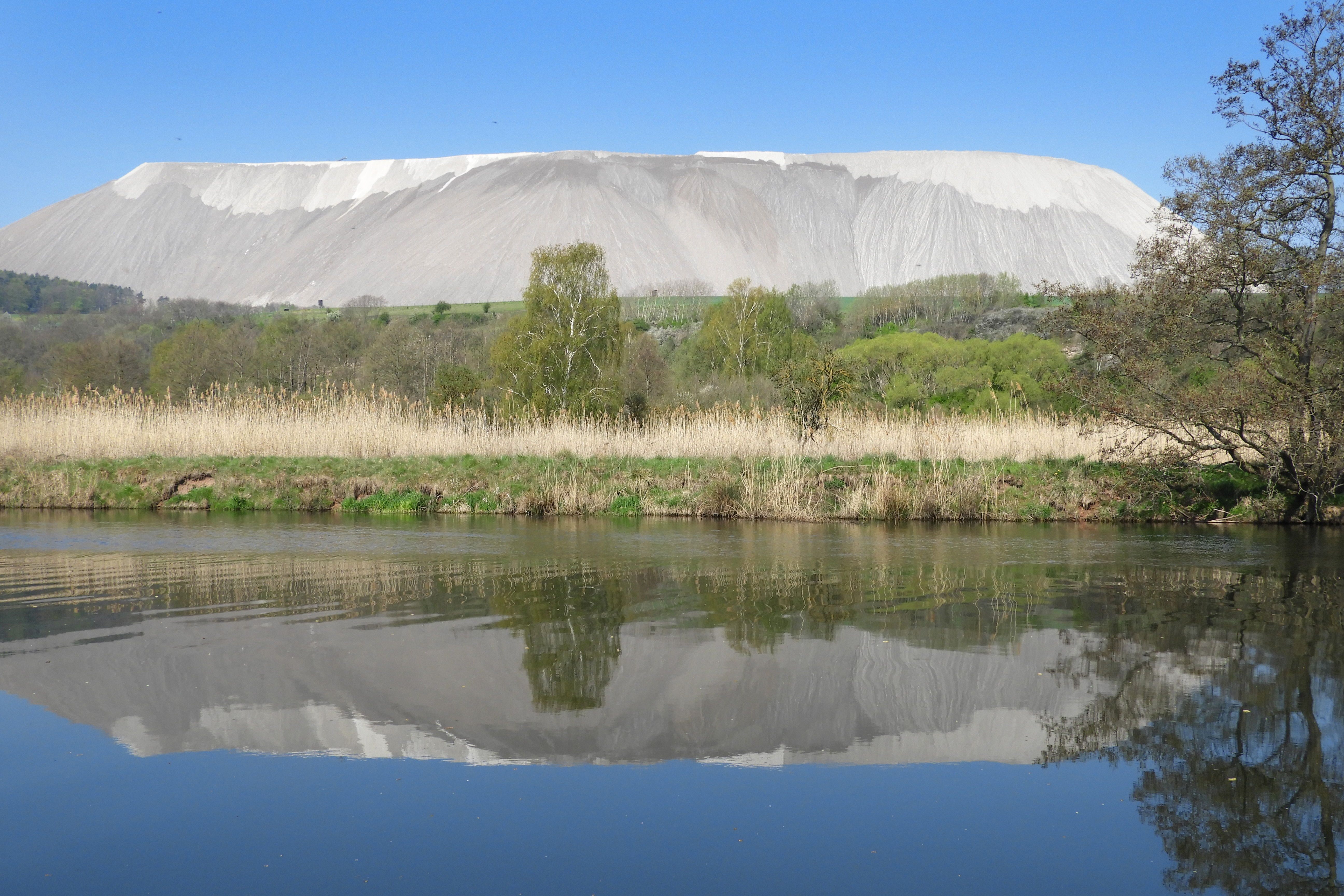 Die „Rohrlache von Heringen“ liegt in den Gemarkungen der Ortsteile Widdershausen, Leimbach und Heringen der Stadt Heringen im osthessischen Landkreis Hersfeld-Rotenburg. Der Auenbereich im Werratal, in der Nähe der Landesgrenze zu Thüringen, besitzt eine artenreiche Salzflora von hoher ökologischer Bedeutung. Hier ist mit Salzpfannen und Salzwiesen eine der größten Salzstellen des Binnenlands. Bemerkenswert ist die hohe Zahl von Vogelarten, die die Rohrlache als Brut- und Rastplatz sowie als Gebiet für die Nahrungssuche nutzen. Die Rohrlache wird als ein seltenes Beispiel für einen schützenswerten Landschaftsbereich angesehen, bei dessen Entwicklung natürliche Ursachen mit den Auswirkungen industrieller Tätigkeit zusammenwirkten. Im Juli 1979 wurde die Rohrlache zum Naturschutzgebiet erklärt. Seit 2008 gehört der Bereich als Flora-Fauna-Habitat-Gebiet mit der Nummer 5026-301 und als ein Teil des EU-Vogelschutzgebiets 5026-402 „Rhäden von Obersuhl und Auen an der mittleren Werra“ zu dem europäischen Schutzgebietsnetzwerk Natura 2000. Außerdem liegt die Rohrlache in dem im Jahr 1992 ausgewiesenem Landschaftsschutzgebiet „Auenverbund Werra“. This is a picture of the protected area listed at WDPA under the ID 82435